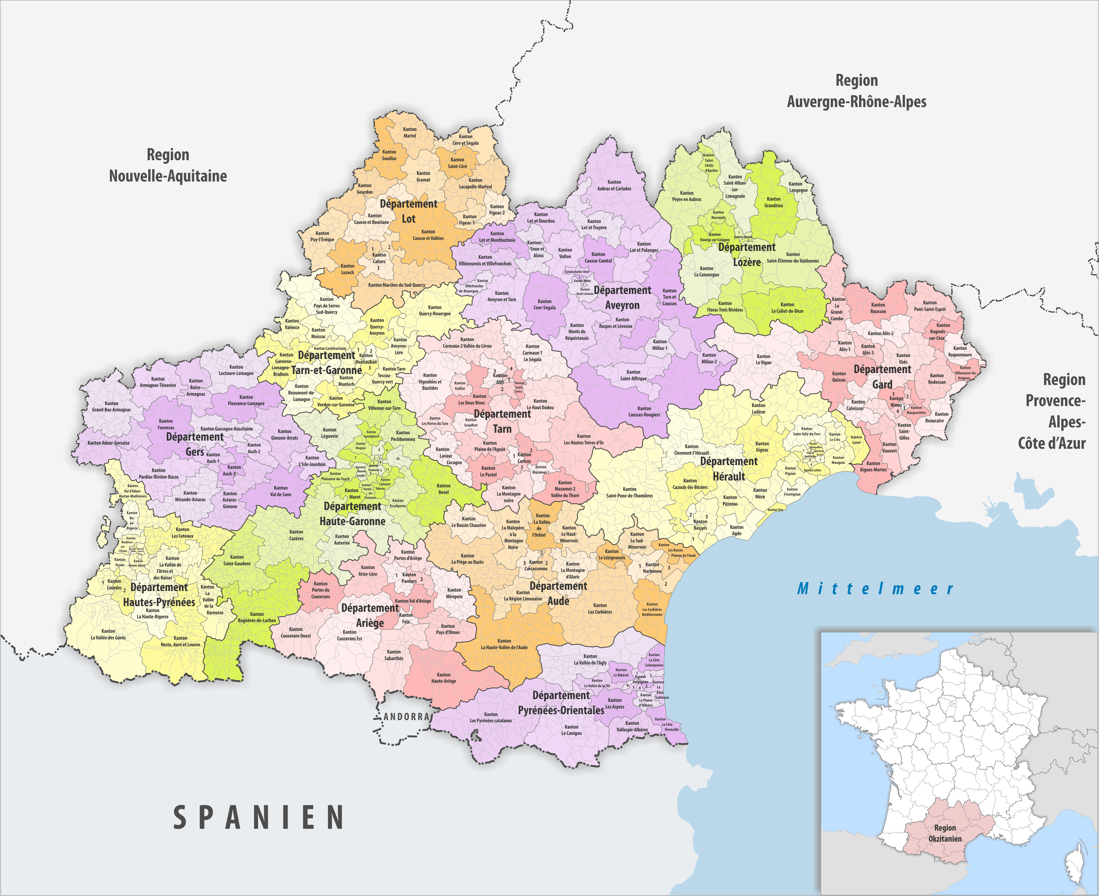 Gemeinden, Kantone und Departemente in der Region Okzitanien